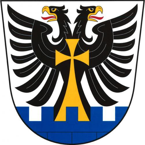 znak, Vračovice Orlov, okres Ústí nad Orlicí